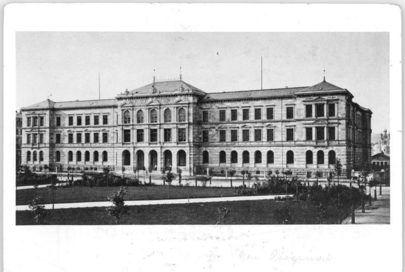 Dresden, Technische Hochschule, “Alte Hochschule” Zentralbild 4.6.1953 125 Jahre Technische Hochschule Dresden Vom 4- - 6.Juni1953 begeht die Technische Hochschule Dresden, die einzige in der Deutschen Demokratischen Republik und die größte polytechnische Hochschule Deutschlands, ihr hundertfünfundzwanzigstes Bestehen. UBz: Die “Alte Hochschule”. Sie wurde 1945 von amerikanischen Bomben zerstört.